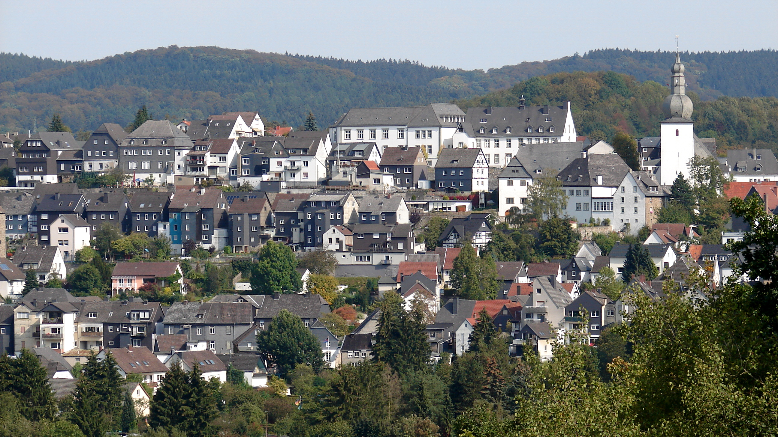 Arnsberg ist eine große kreisangehörige Stadt im Sauerland im Land Nordrhein-Westfalen und Sitz des Regierungsbezirks Arnsberg.